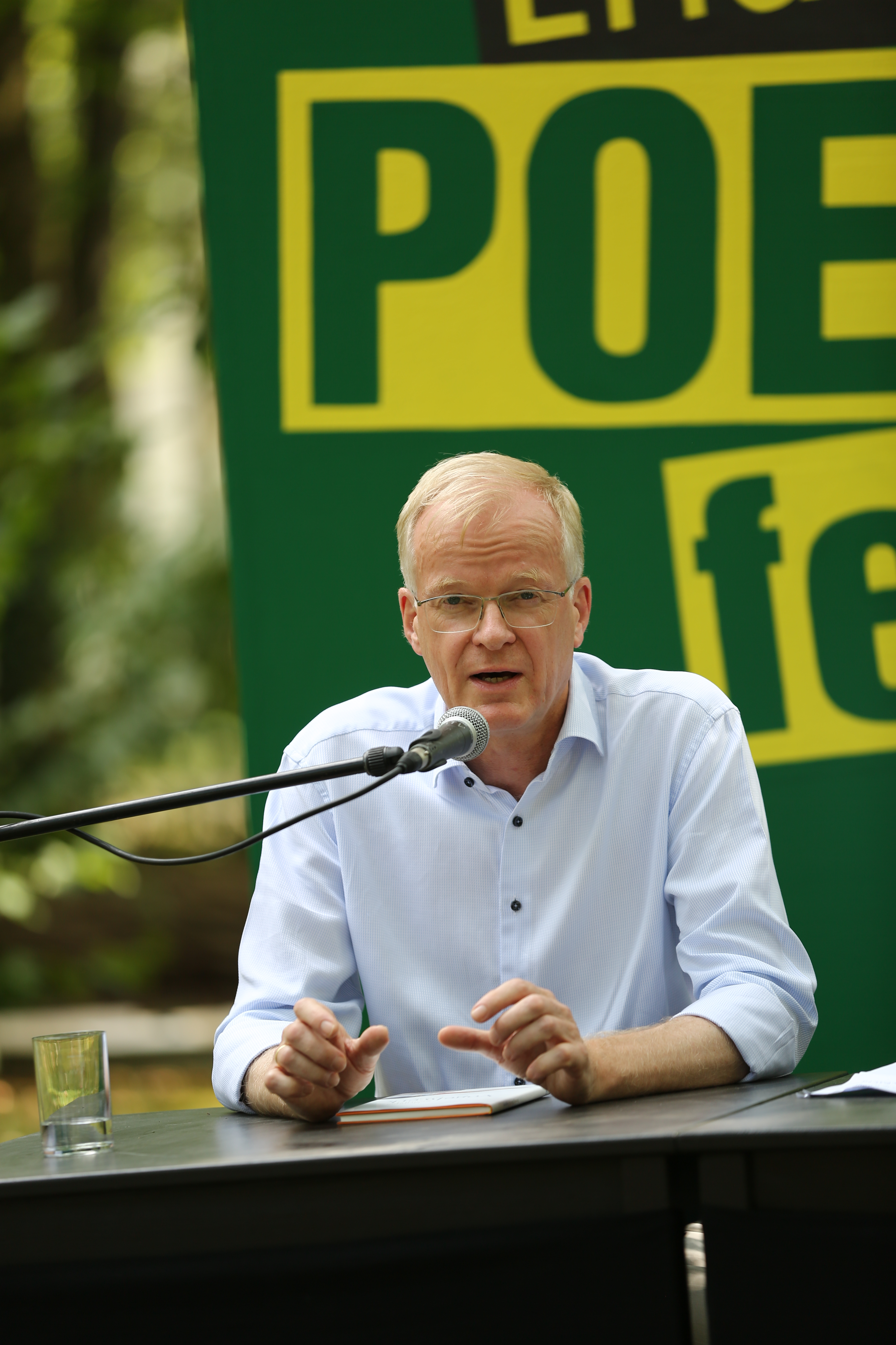 Henning Ziebritzki stellt auf dem Erlanger Poetenfest 2019 seinen Gedichtband "Vogelwerk" vor.